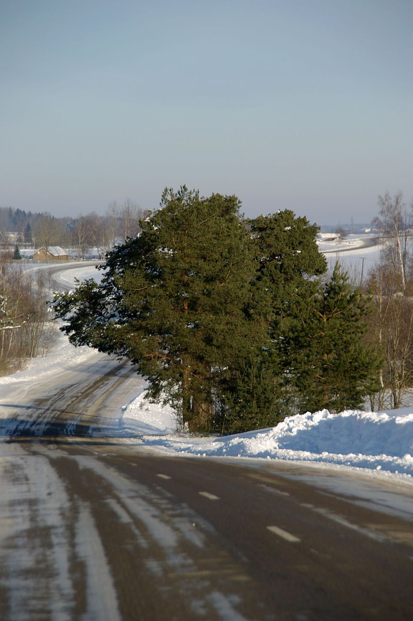 Raudemetsa mänd asub Türi lähedal Pala külas väikevoorel Türi–Väätsa maantee ääres. Põlismänni laiuv võra meenutab vihmavarju ning haarad ulatuvad nii põllu kui ka tee kohale.Puu kõrgus küünib 12 meetrini, tüve ümbermõõt on 3,7 m, ta on looduskaitse all.